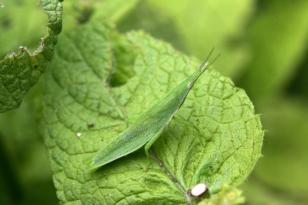 Atractomorpha lataAtractomorpha lata